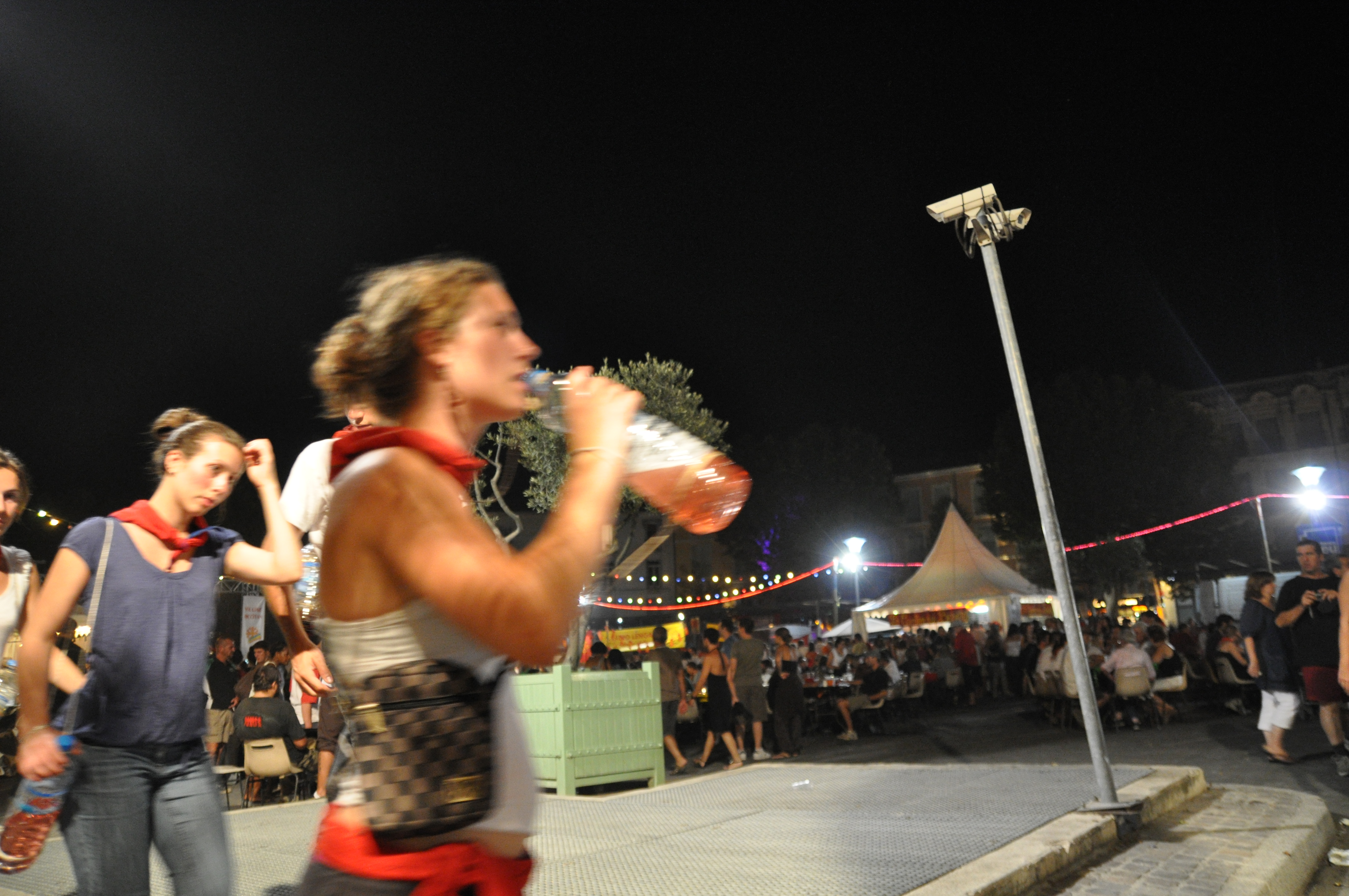 Du rosé de pays au goulot lors de la Feria de Béziers